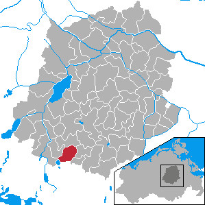 Kittendorf, Landkreis Demmin, Mecklenburg-Vorpommern